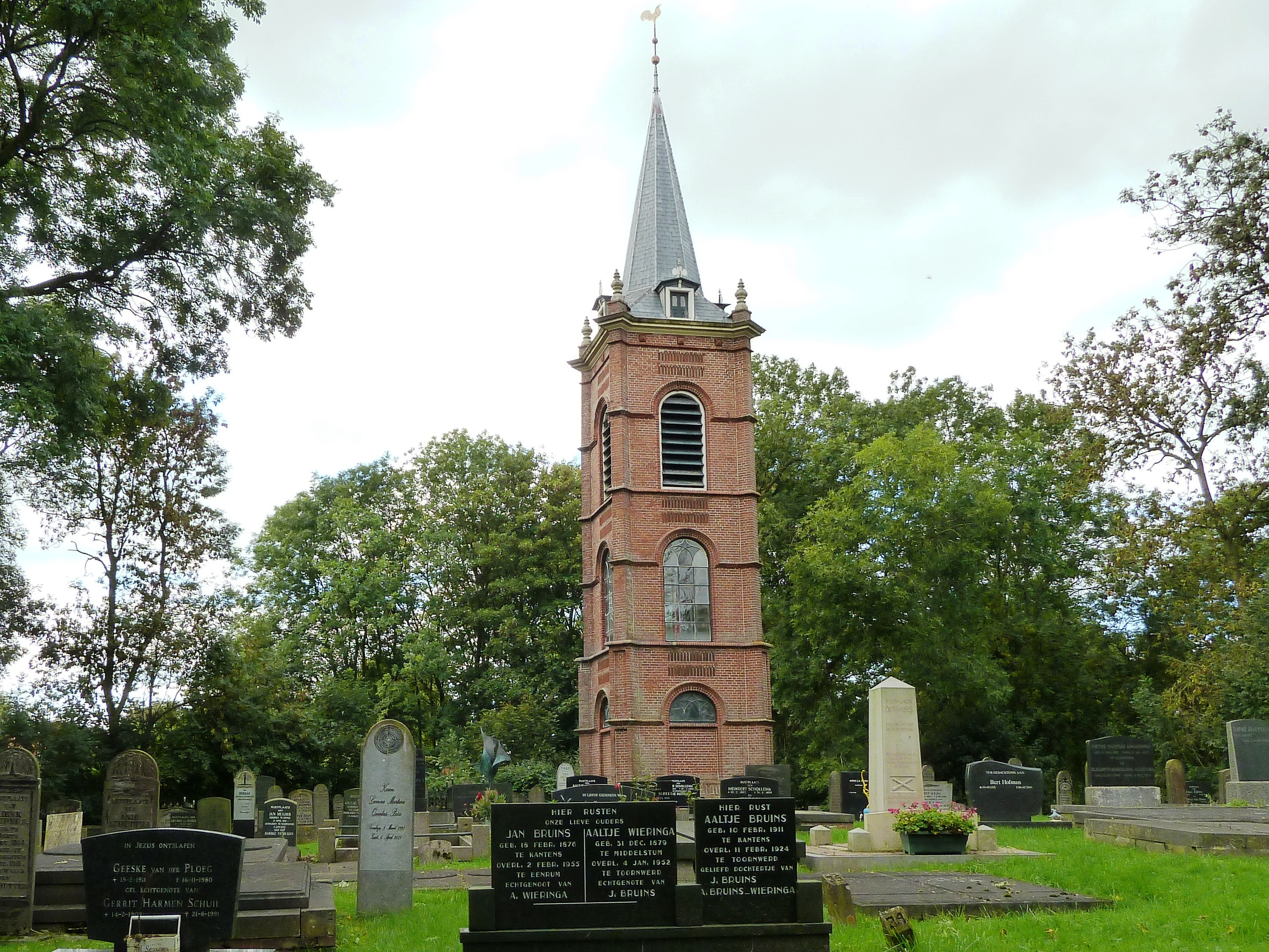 Torentje op het kerkhof van Toornwerd